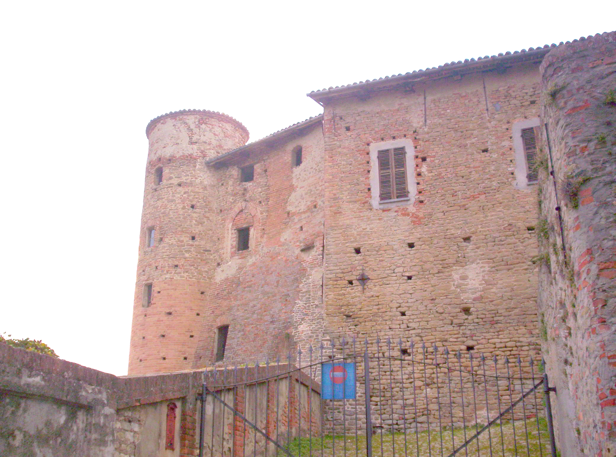 castle of Castiglione Falletto